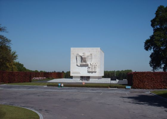 Ardennes Memorial